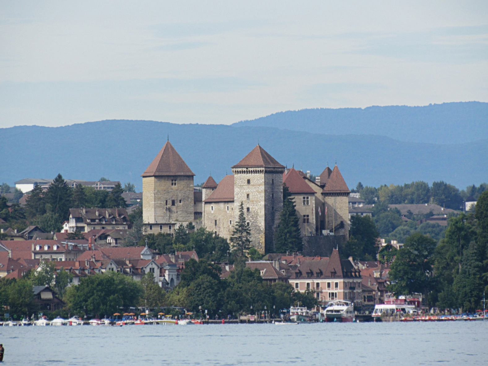 Vue générale du château d'Annecy .